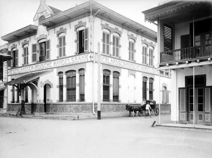 Negatief. Na de kredietcrisis van 1863 nam de vraag naar kapitaal voor particuliere cultuurmaatschappijen toe. Een van de toen opgerichte 'cultuurbanken' was de Nederlandsch-Indische Handelsbank (NIHB, ook wel kortweg de Handelsbank). Deze kwam zelf in de problemen ten tijde van de wereldwijde zogeheten Agrarische Crisis die ook aan Indië niet voorbijging en zelfs dieper werd door het optreden van ziektes in koffie en suiker. Met behulp van het Nederlandse bankwezen werd de Indische banksector toen (ca. 1885) gesaneerd, waarbij de agrarische belangen van de Handelsbank werden overgedragen aan een nieuwe cultuurbank, De Nederlandsch-Indische Landbouw Maatschappij. (P. Boomgaard, 2001). Nederlandsch-Indische Handelsbank te Semarang